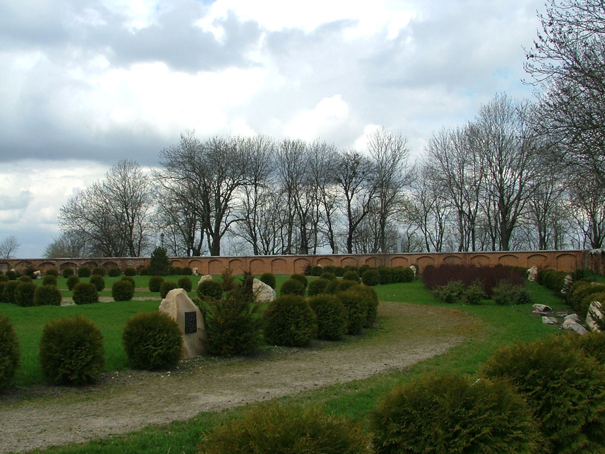 Chełm - Sanktuarium Maryjne na Górze Chełmskiej, Ogród Matki Bożej, Zielony Różaniec